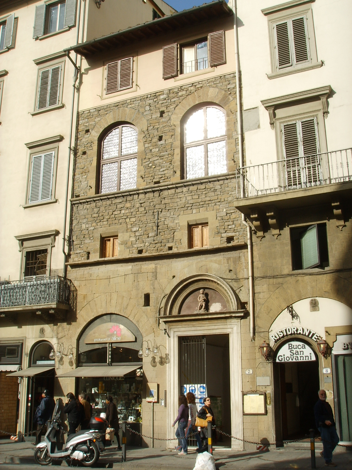 Casa di san giovanni, firenze